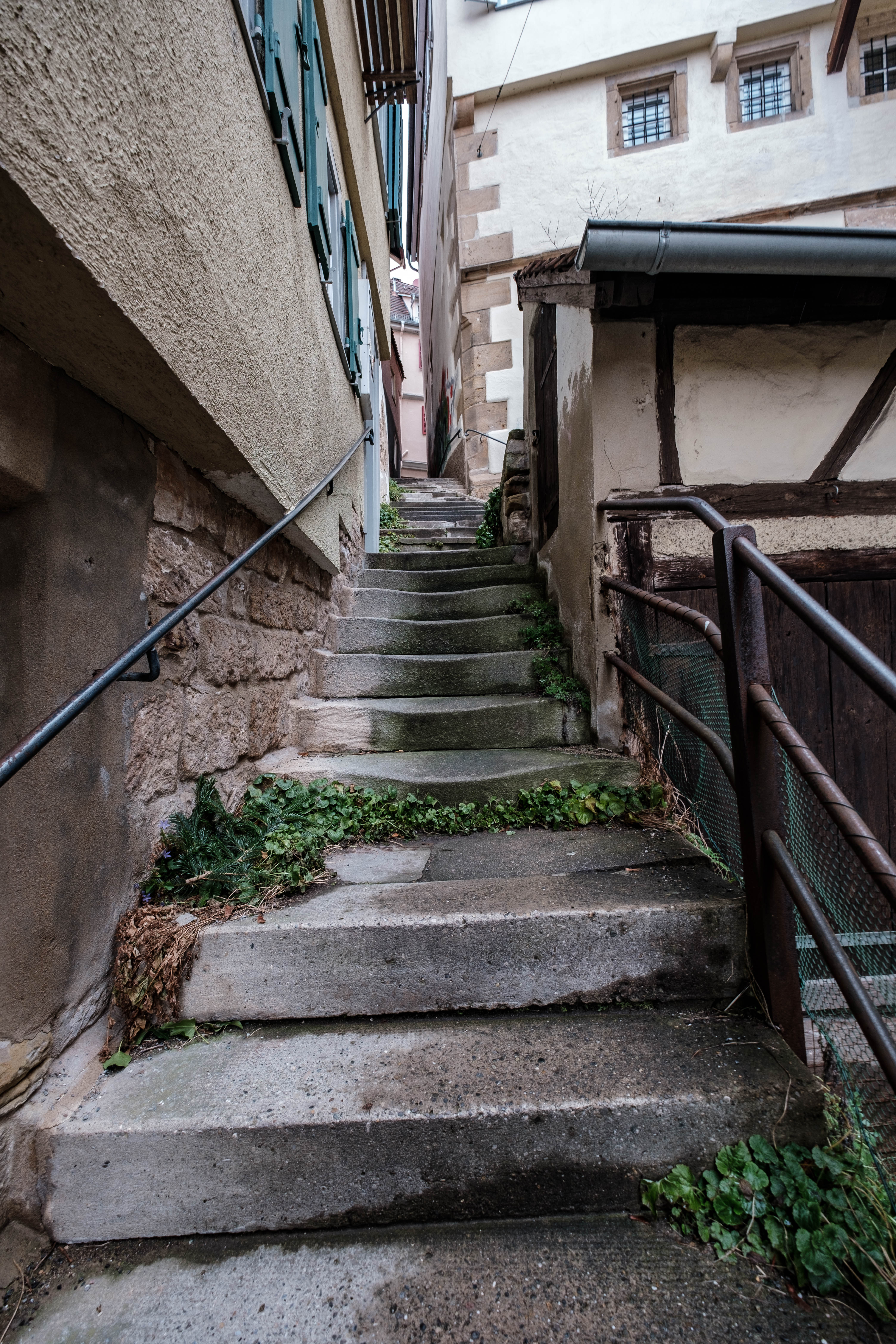 Treppe in der Bursagasse in Tübingen